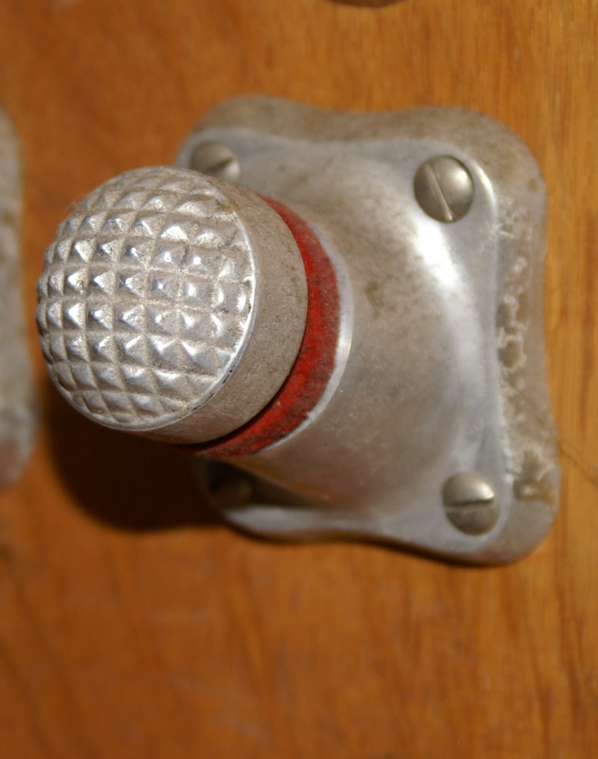 Piston: Steuerungsknopf der mit dem Fuß betätigt wird, zur Steuerung oder Bedienung einer modernen Pfeifenorgel. Bauform um 1970